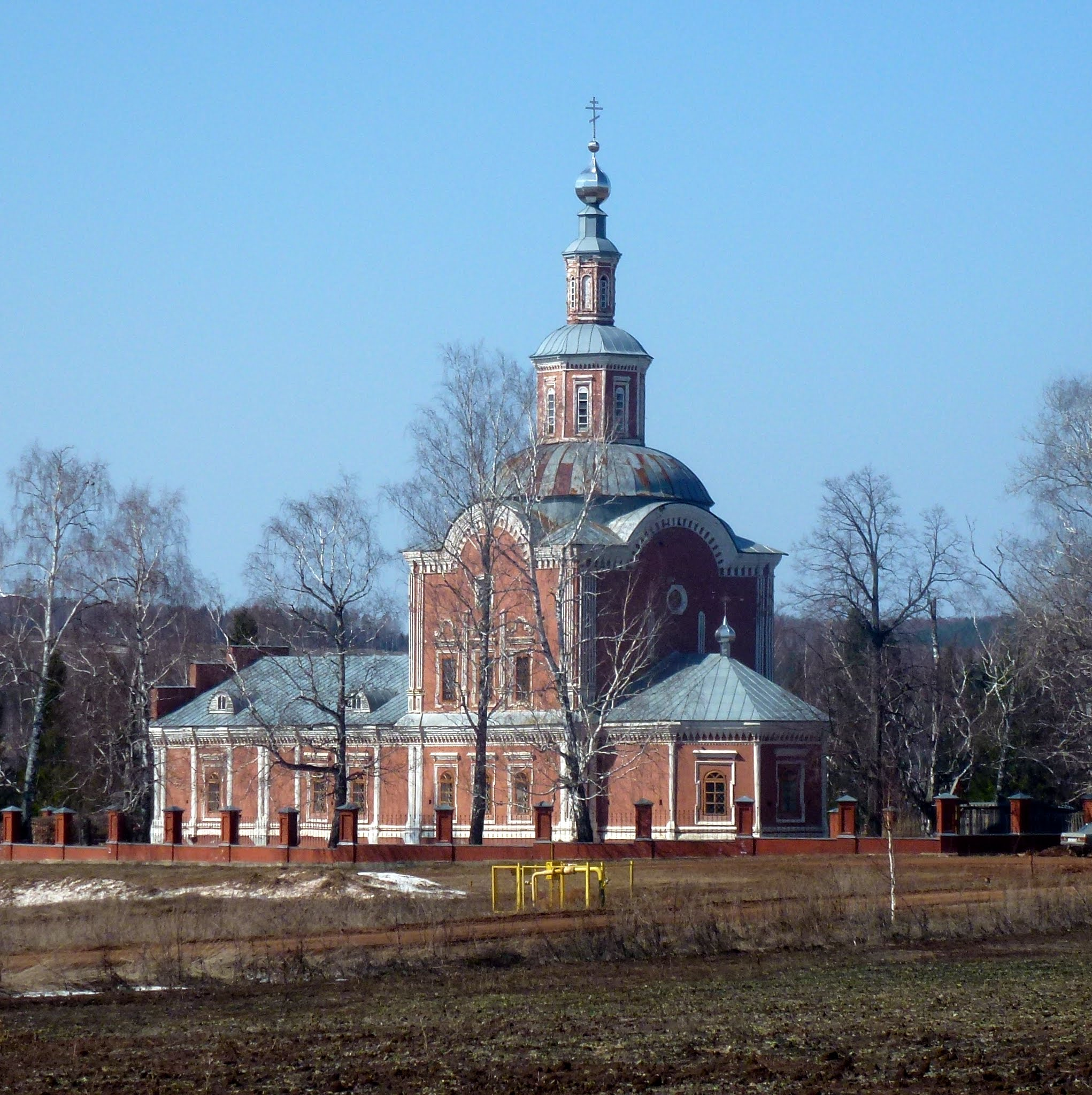 Шерья, Храм иконы Одигитриевской Божей Матери (путеводительницы),основан в 1759 г.